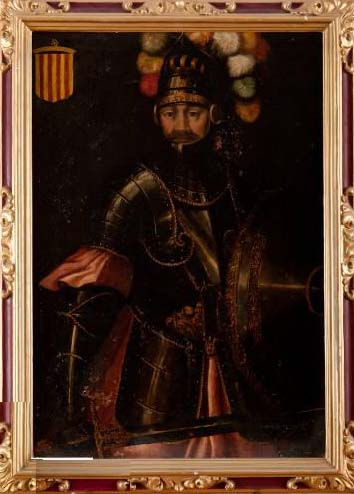 Retrat imaginari del comte Ramon Berenguer III de Barcelona